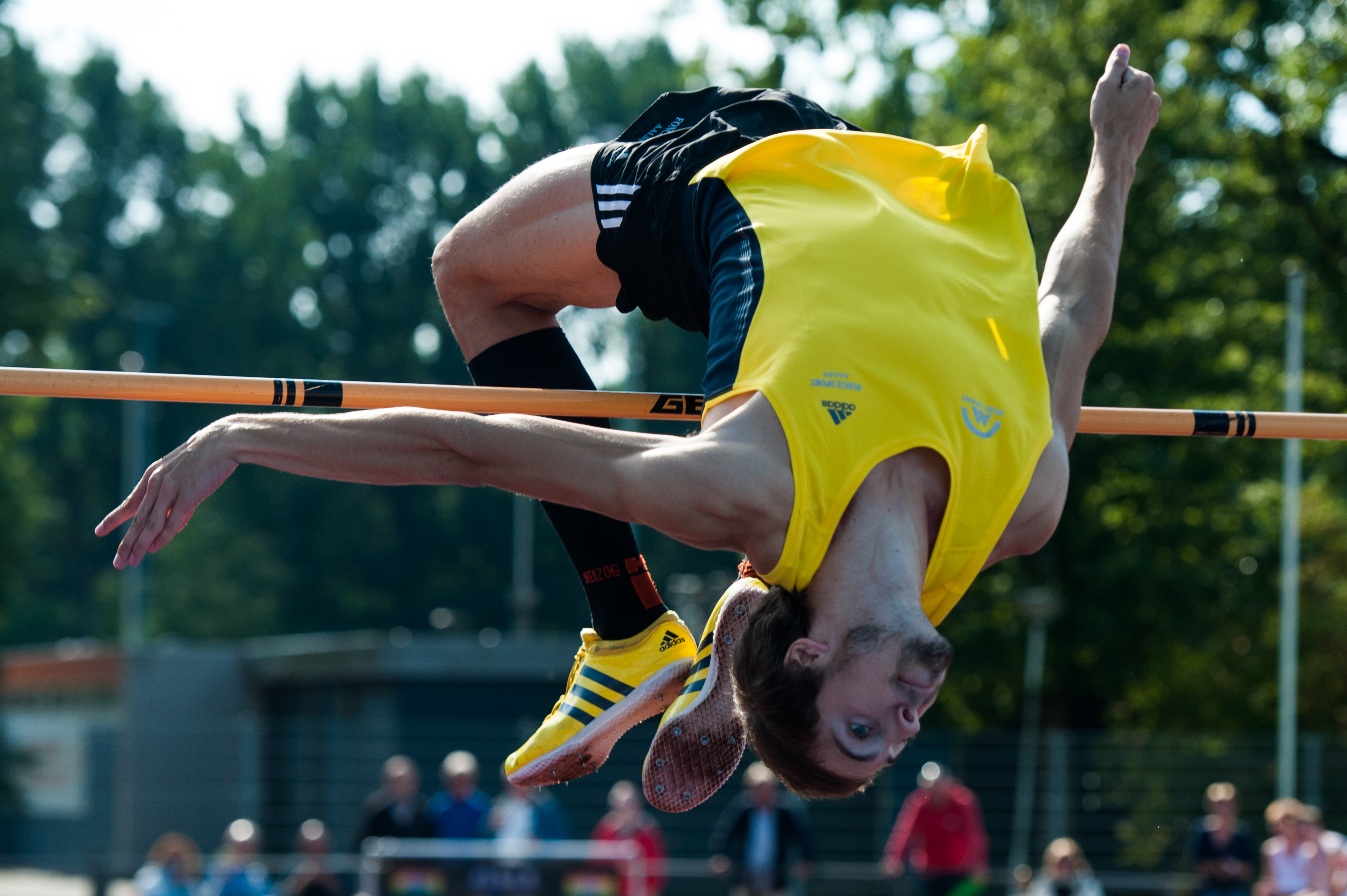 Bram Ghuys in actie in 2013.